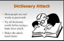 Монгол: Зураг-1